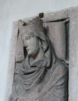 Hemma (Ostfrankenreich)